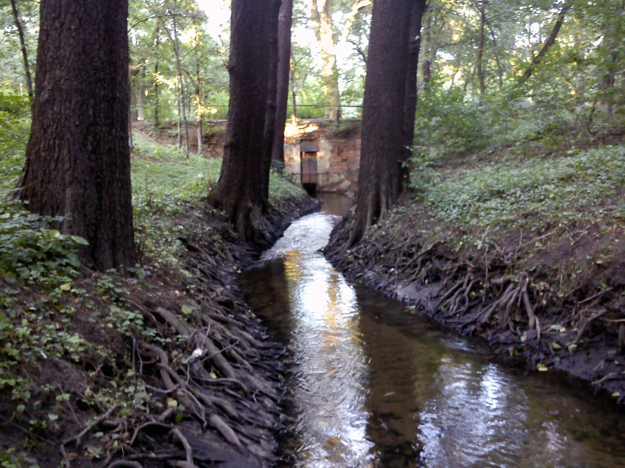 Struga Wielanda w Parku Tysiąclecia w Toruniu.